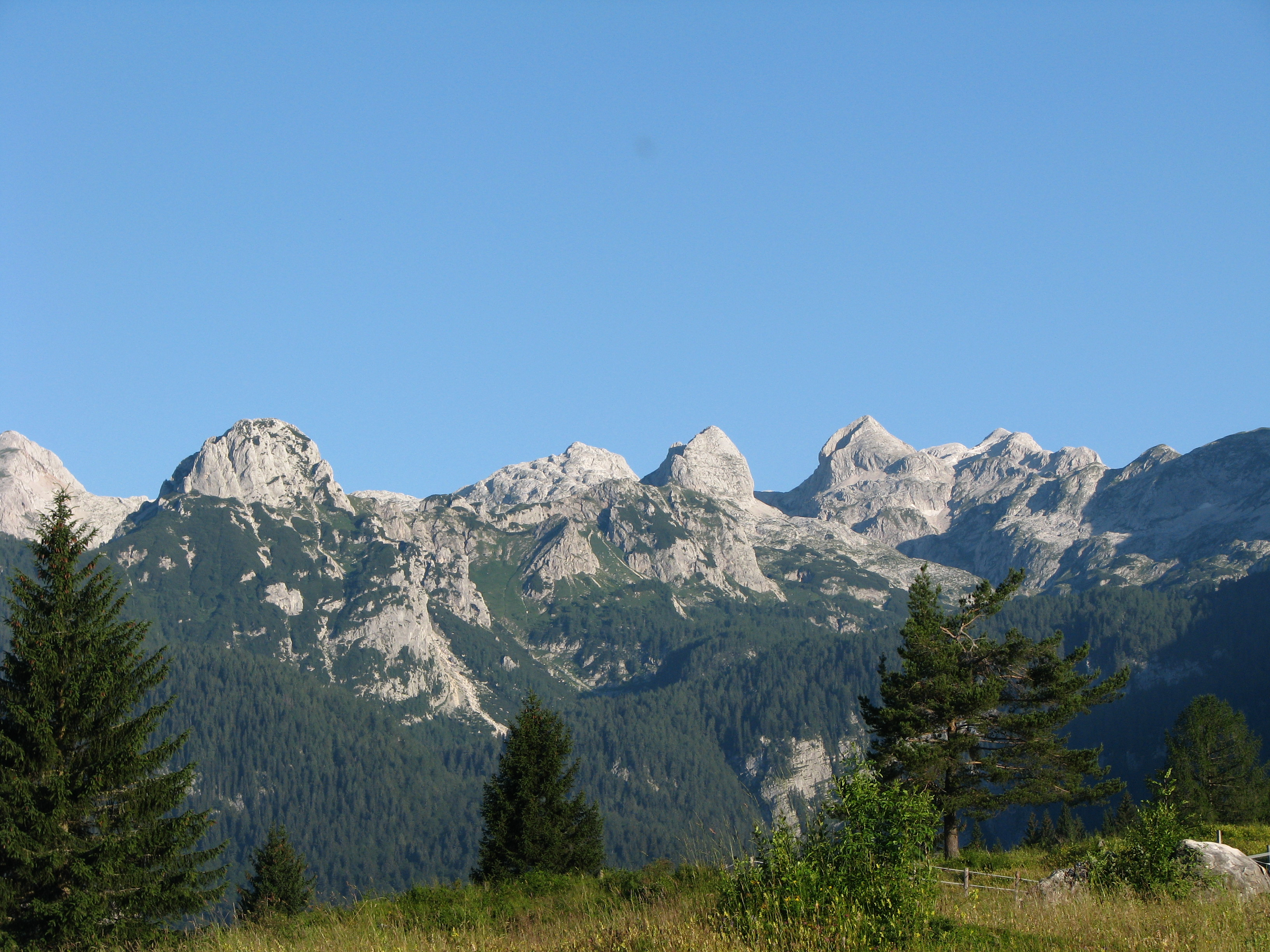 Triglavsko pogorje: Jezerski stog (2040 m), Vrh hribaric (2388 m), Škednjovec (2309 m), Mišeljski konec (2464 m), Kanjavec (2568 m), Mišelj vrh (2350 m)